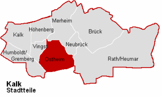 Lagekarte Ostheim im Stadtbezirk Köln-Kalk